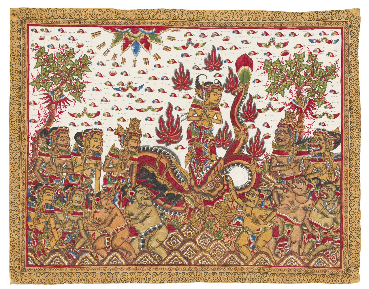 Sutasoma dan Kala